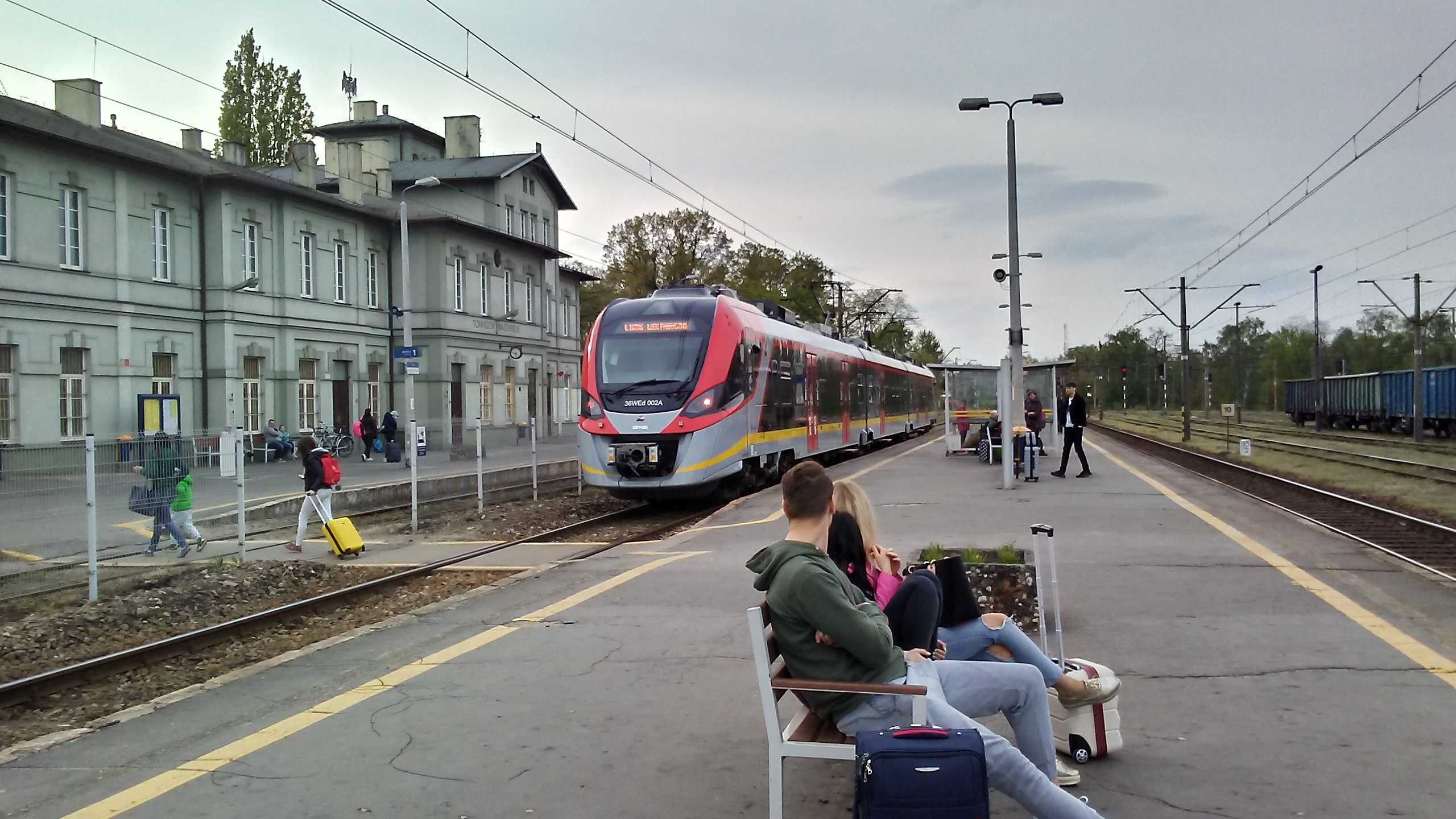 Tomaszów Mazowiecki - Podróżni oczekujący na peronie stacji kolejowej w maju 2019 roku.